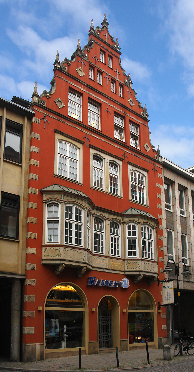 Bremen, Langenstraße 16: Wohn- und Geschäftshaus aus dem Barock, 17. Das abgebildete Objekt ist ein geschütztes Kulturdenkmal in der Freien Hansestadt Bremen, mit der Nr. 0833 beim Landesamt für Denkmalpflege registriert.